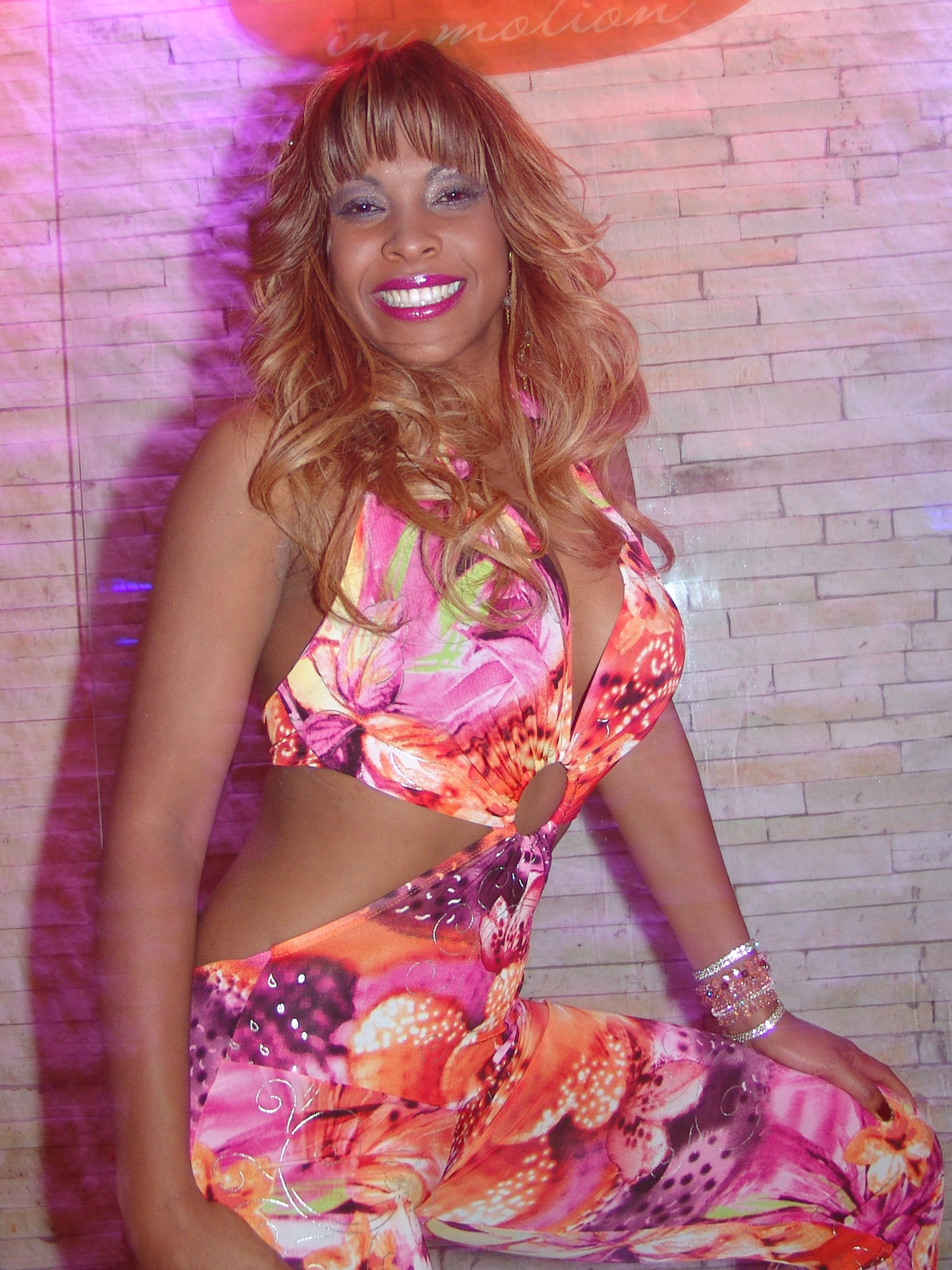 Solange do Big Brother Brasil 4 em 2006.